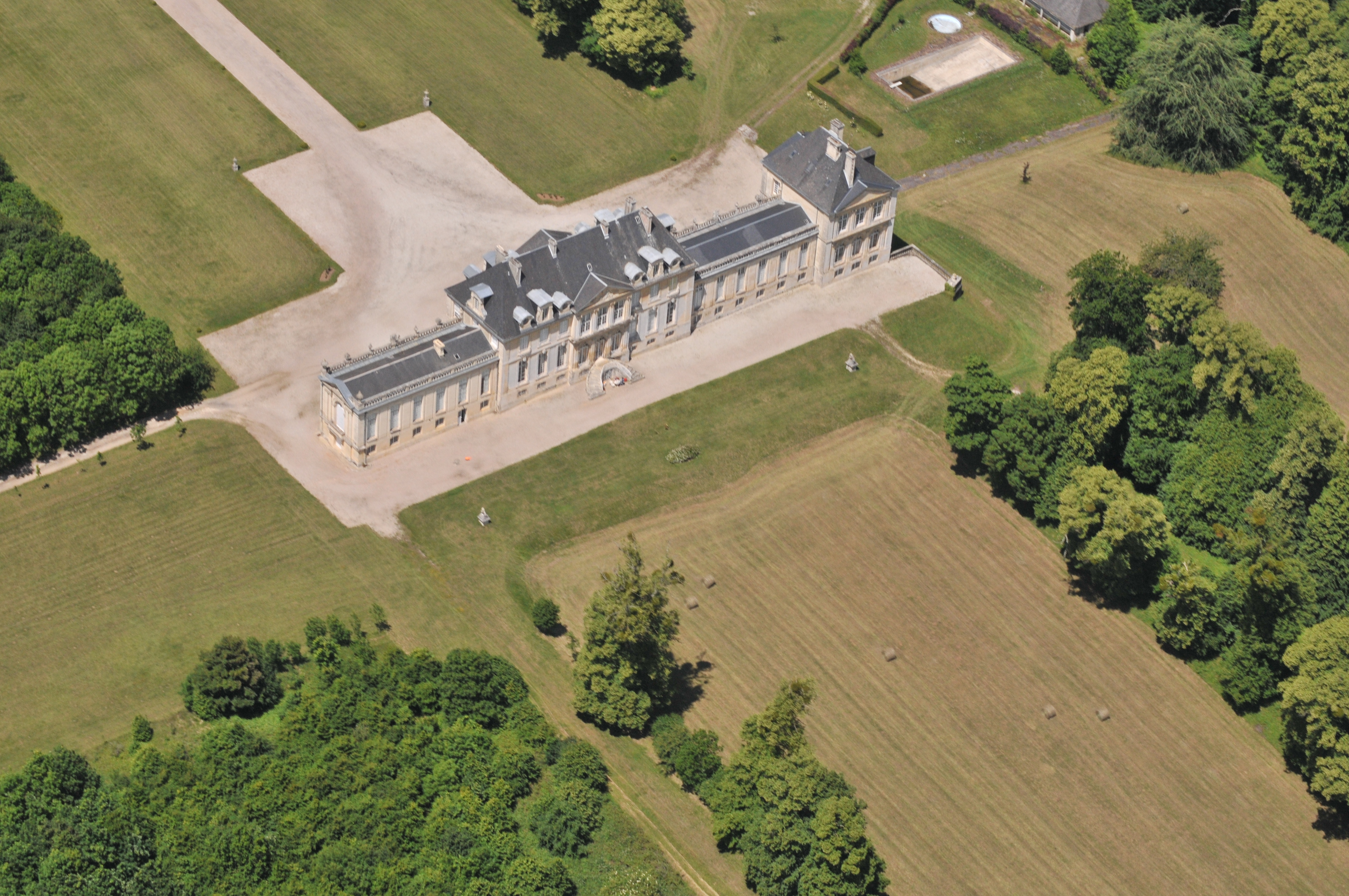 Château de Versainville (Calvados, France)